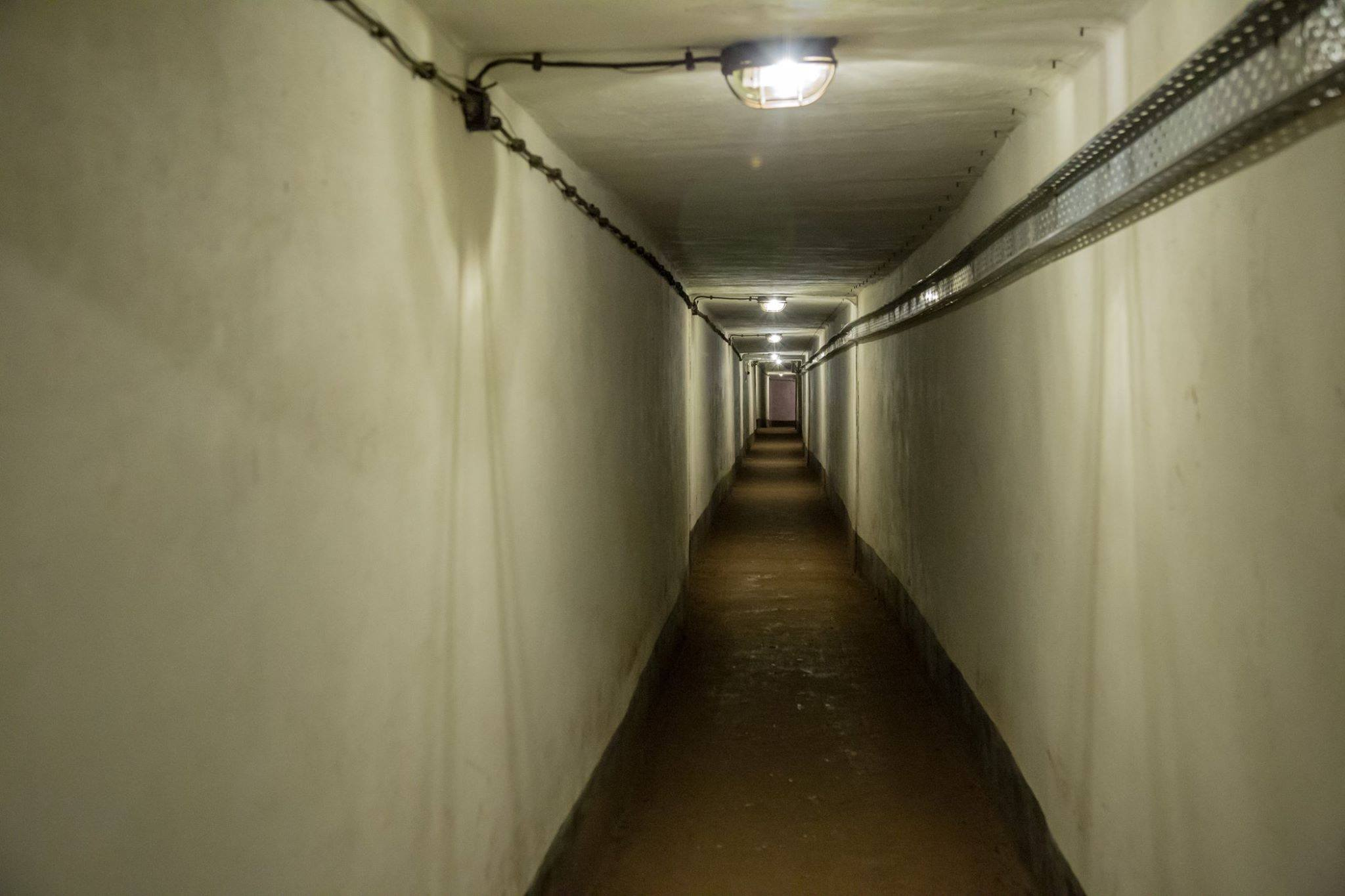 Podziemne Miasto to system 5 schronów połączonych tunelami o łącznej długości przeszło 1,5 kilometra